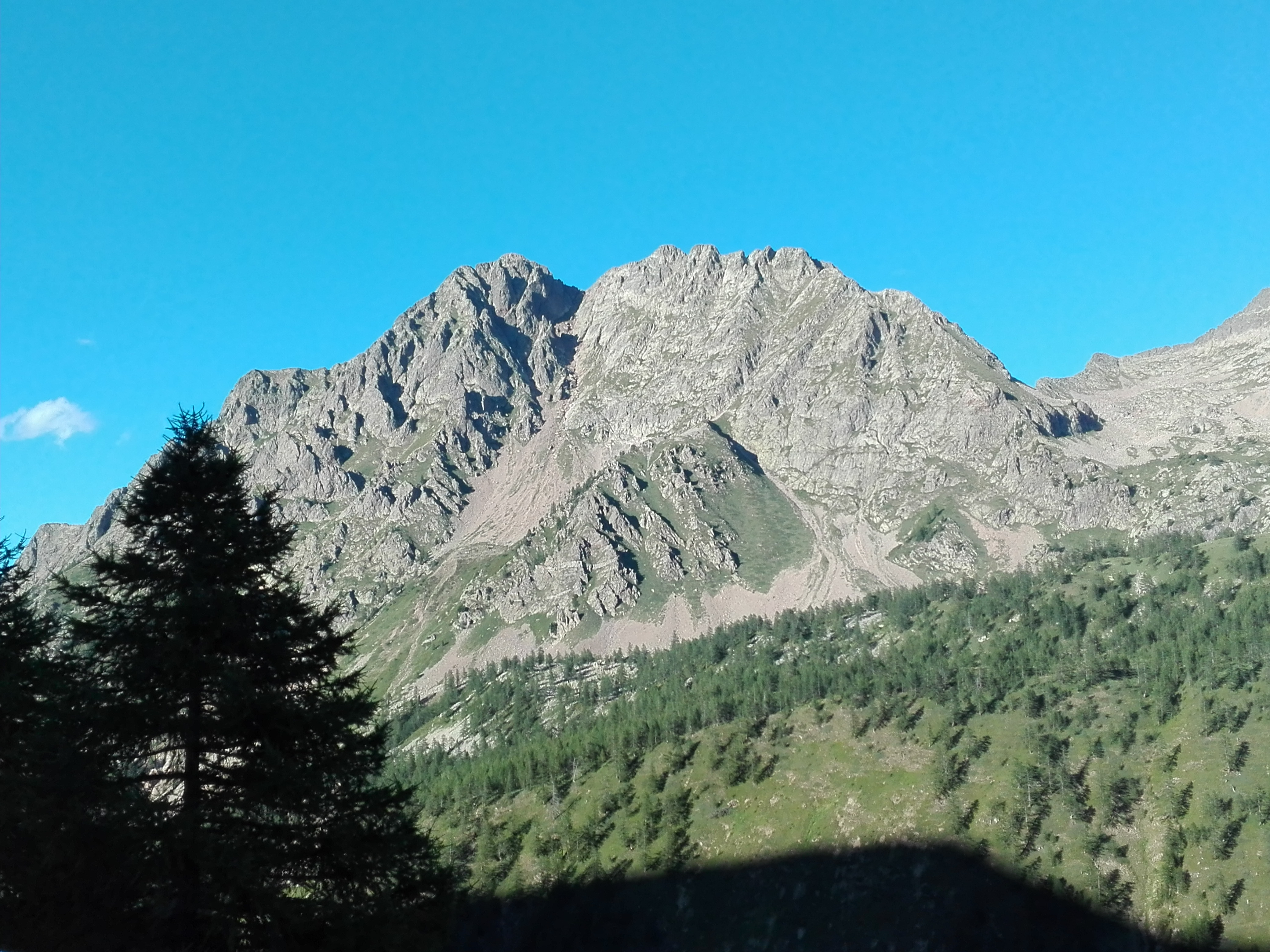 La Punta Maladecia vista dal santuario di Sant'Anna di Vinadio